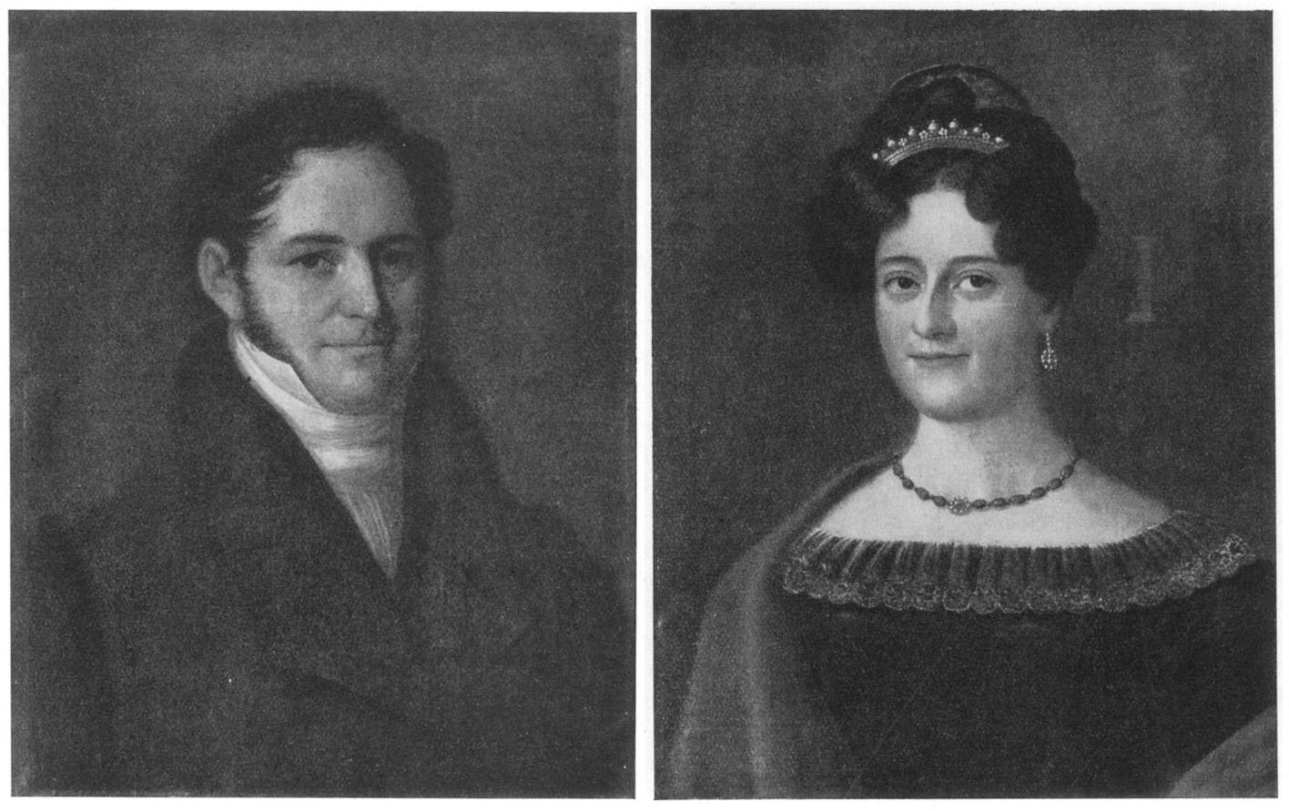 Sjökapten Per Anders Nordvall (1794-1840) och hans hustru Maria Vilhelmina Nordvall (1805-1890), född Schneidler, änka från 1840. Innehavare av Breviks gård från cirka 1820 till cirka 1880. Oljemålning av det nygifta paret från omkring 1824.